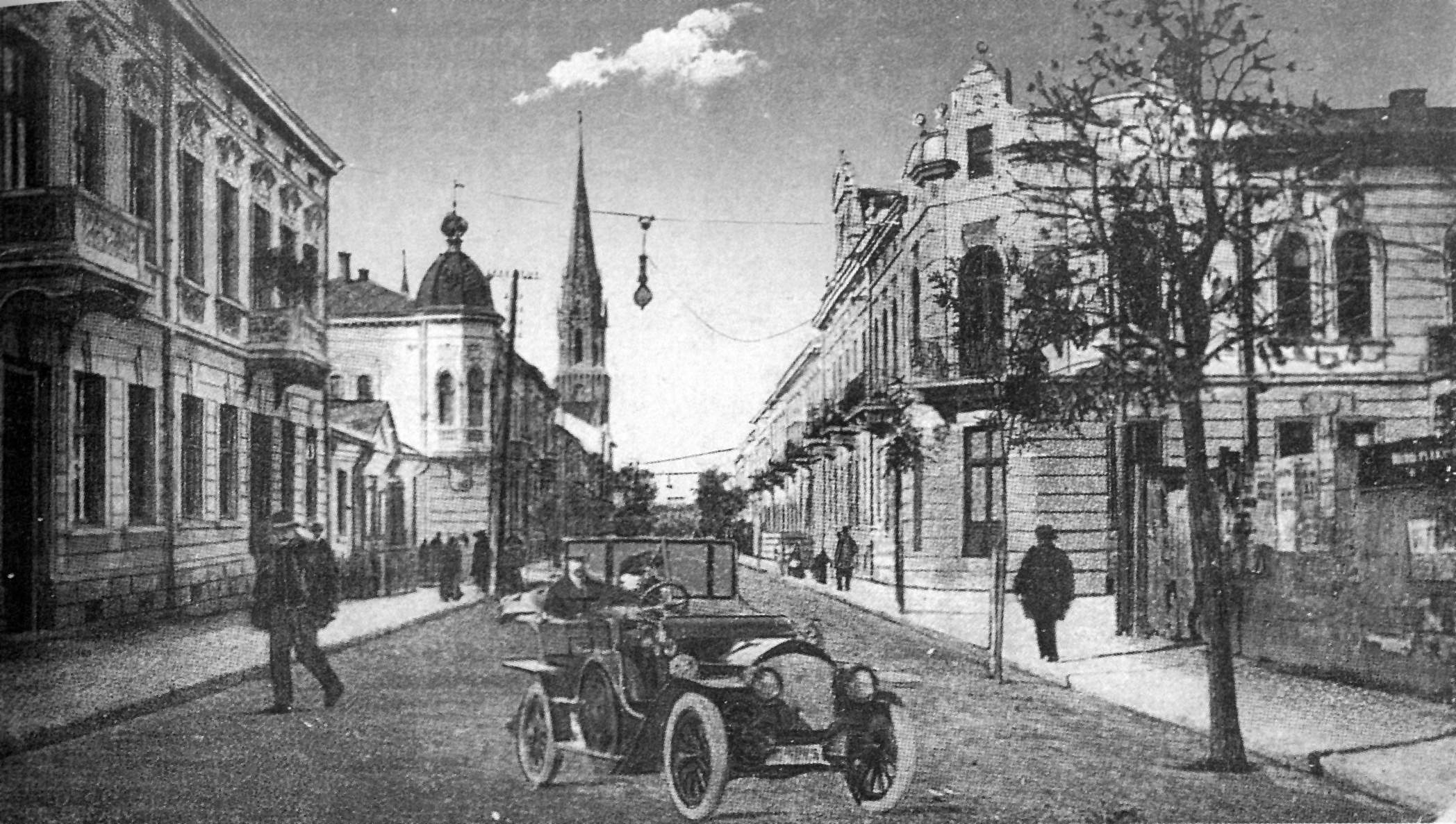 Вул. Руська у Тернополі. На початку ХХ ст.